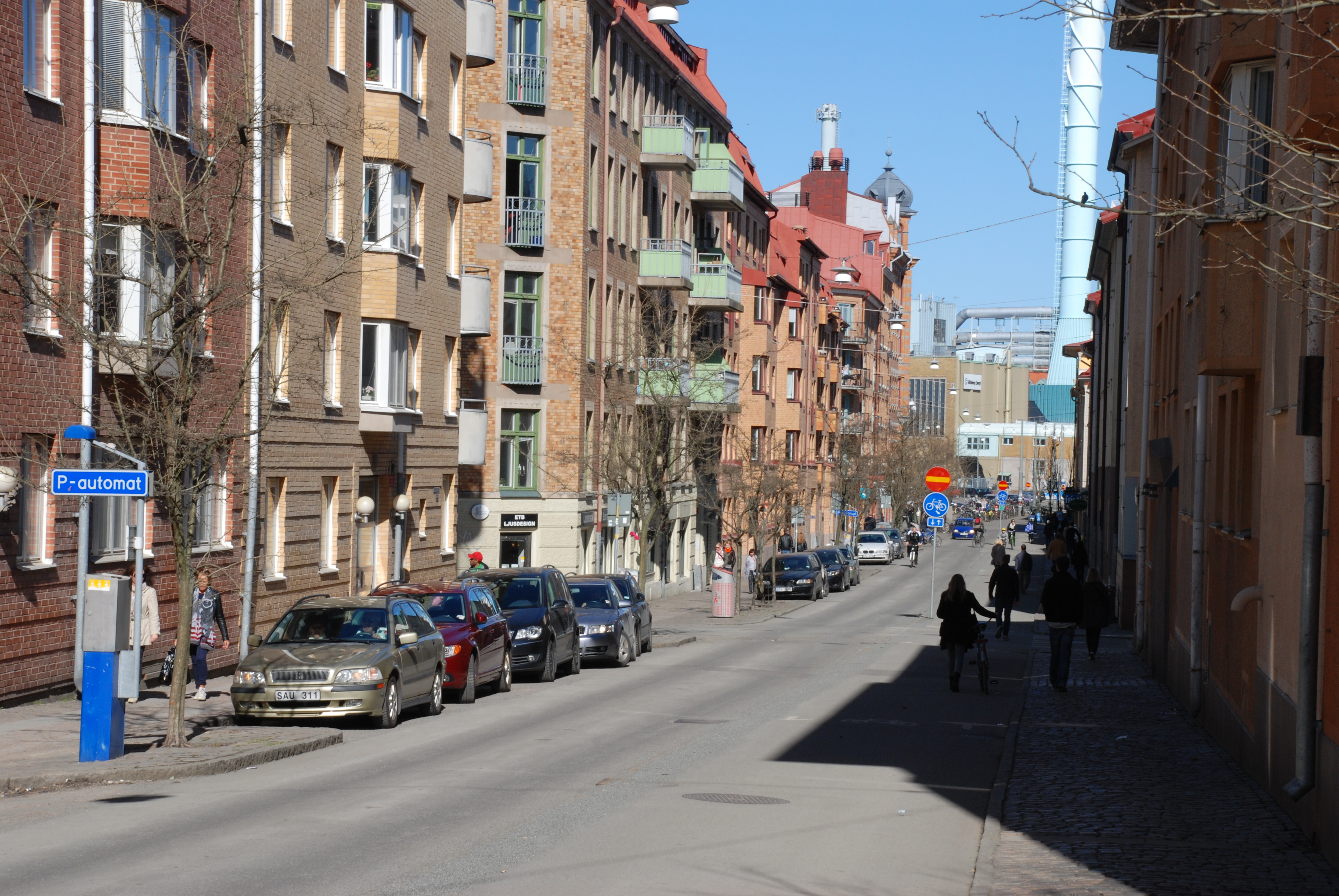 Landsvägsgatan i Haga i Göteborg i riktning mot Järntorget.